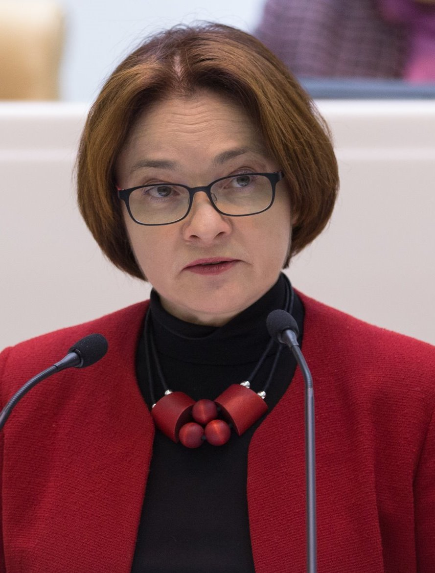 Эльвира Сахипзадовна Набиуллина (род.1963) — российский государственный деятель